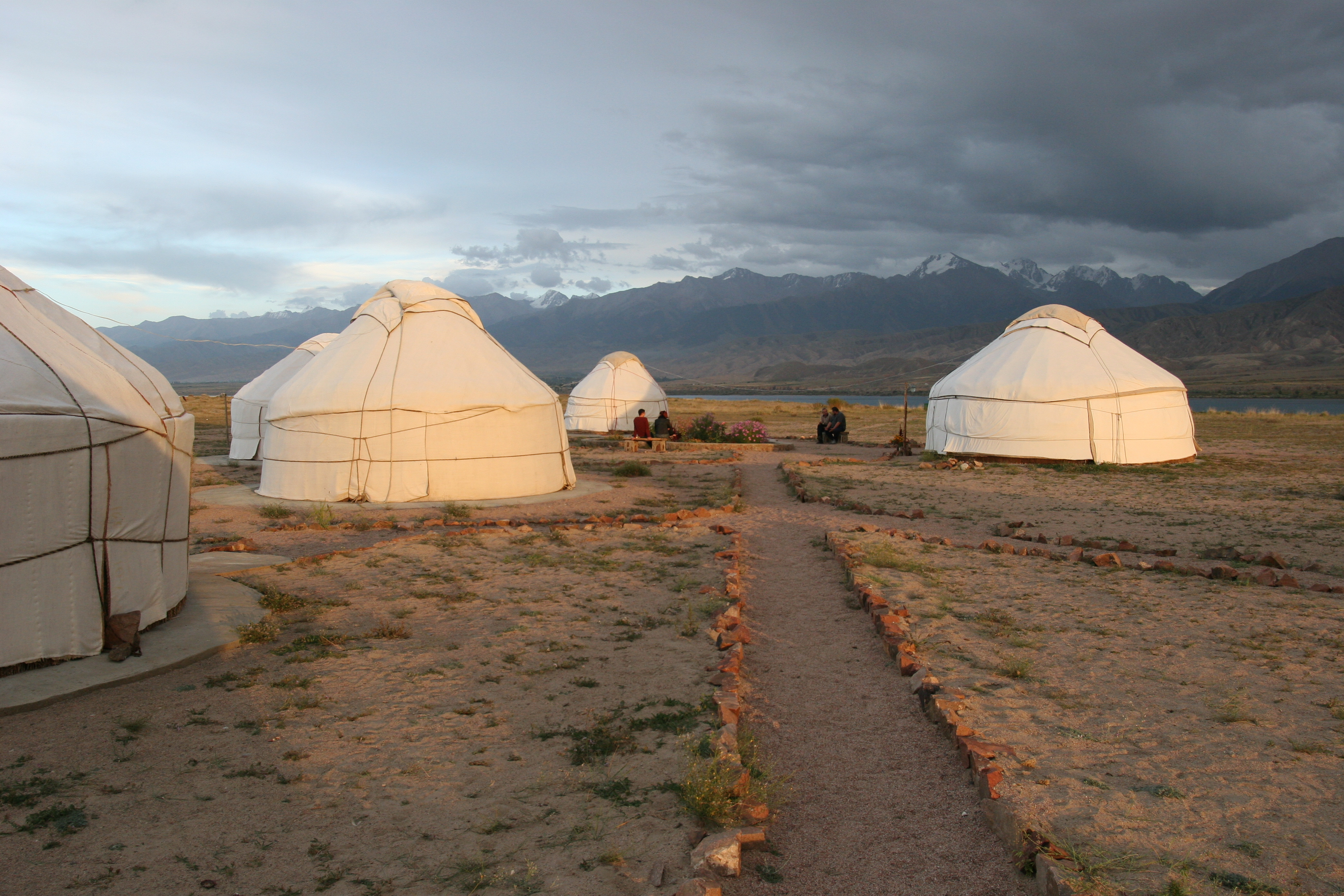 Jurtencamp am Ufer des Yssykköl-Sees